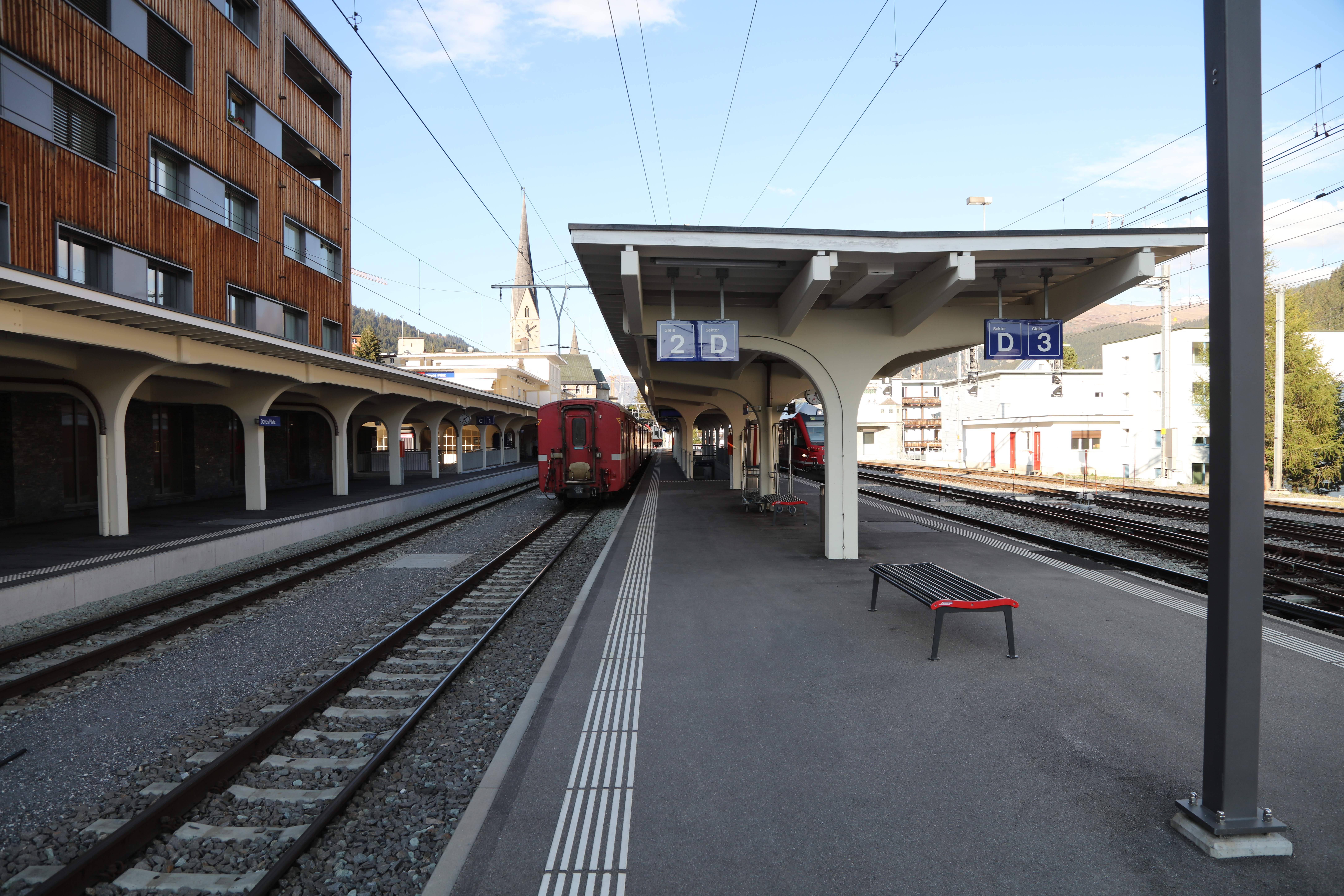 Der Bahnhof Davos Platz.